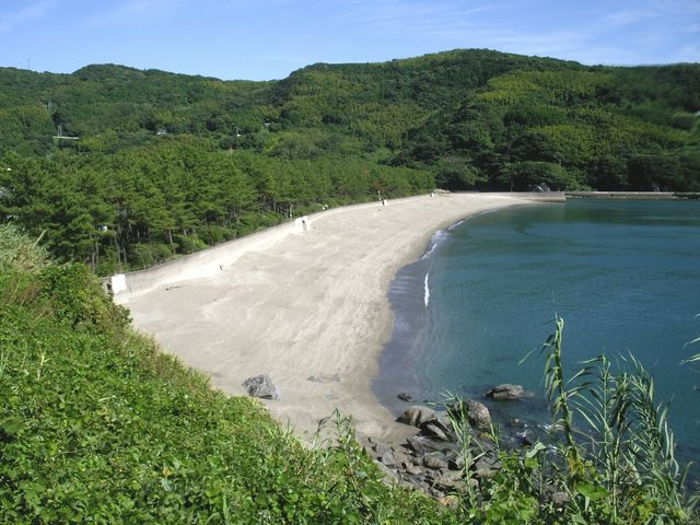 雪浦海水浴場。長崎県西海市雪浦の砂浜と防風林。(Yukinoura-beach in Saikai,Nagasaki)